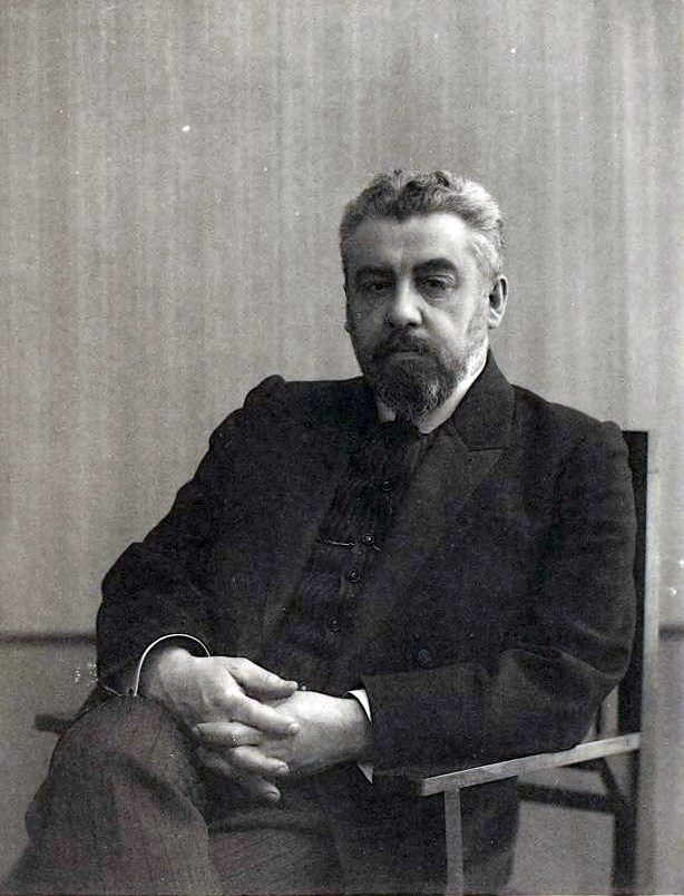 Мануйлов, Александр Аполлонович